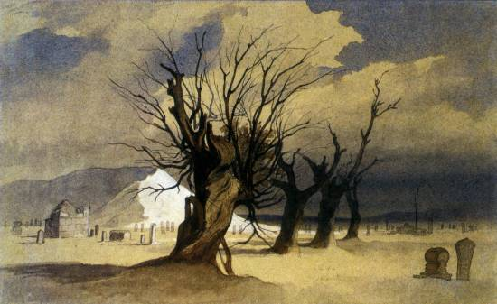 Тарас Шевченко. Ханга-Баба. Кольоровий папір, акварель (17,8 × 28,7). [Н. р. 22.V 1851 — VII 1857].